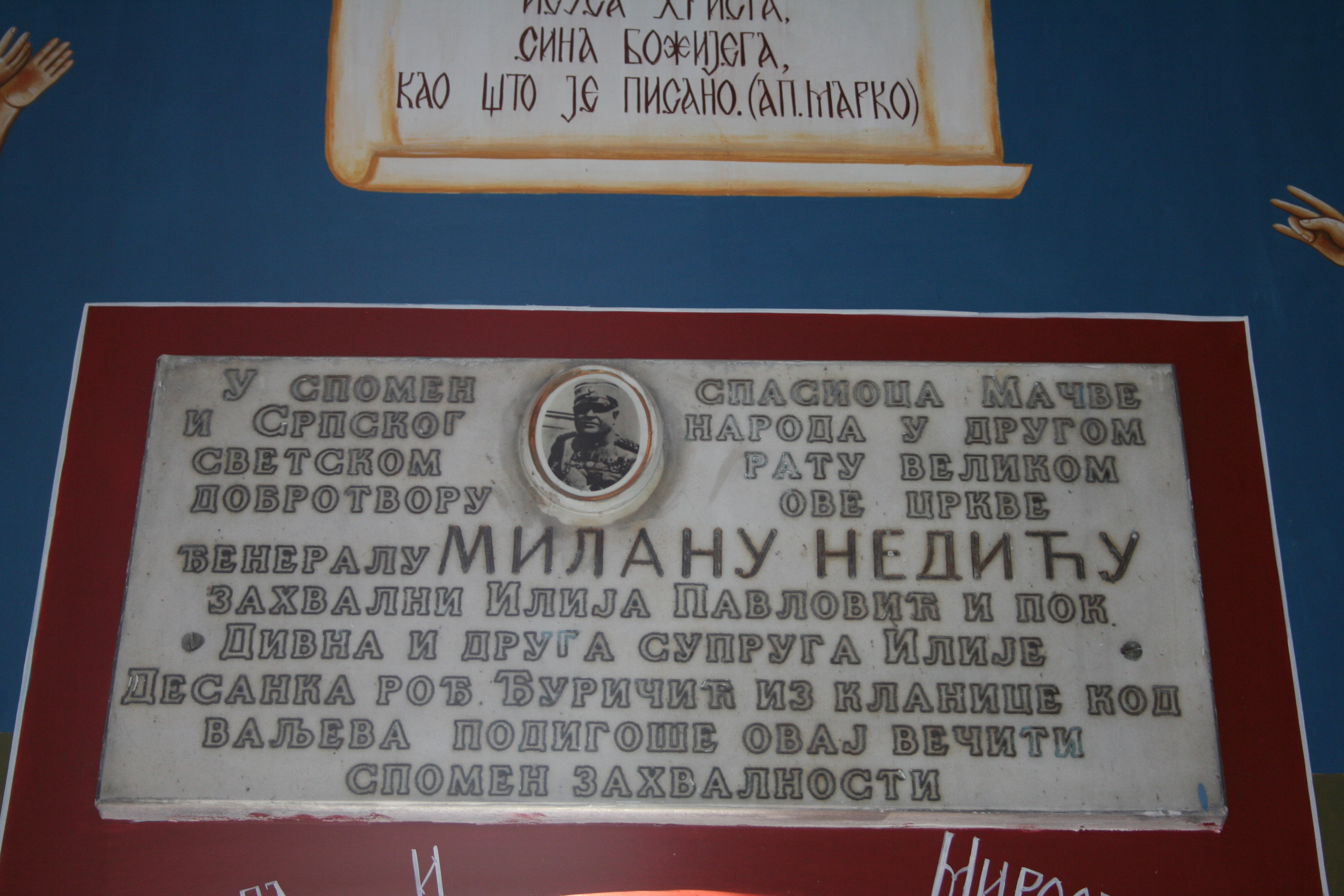 Crkva Sv. Marka, Majur